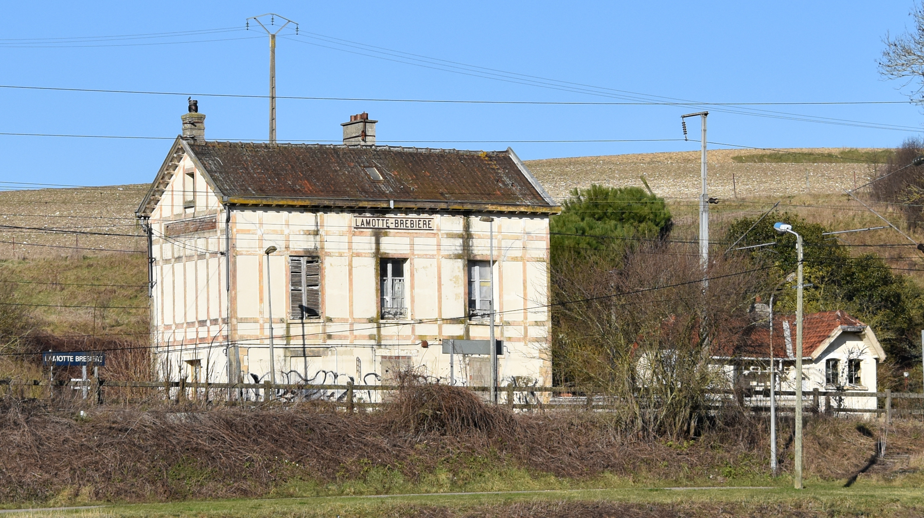 L'ancienne gare de Lamotte-Brebière et sa dépendance vue depuis le chemin de halage le long de La Somme.